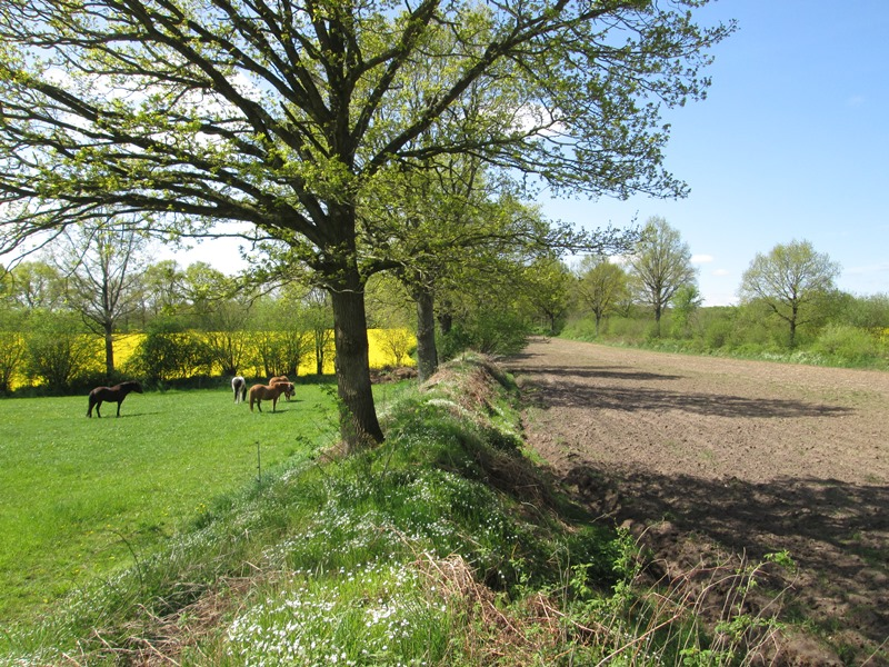 Østervolden vest for Kokkentorp